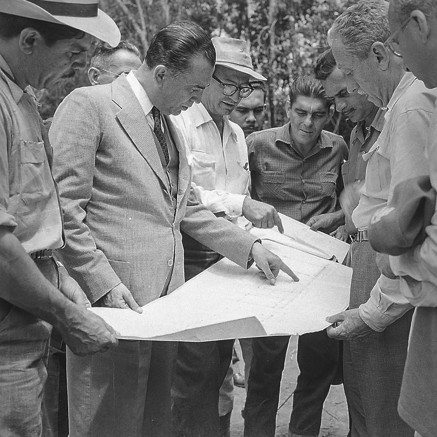 Imagem do Fundo Agência Nacional, do Arquivo Nacional